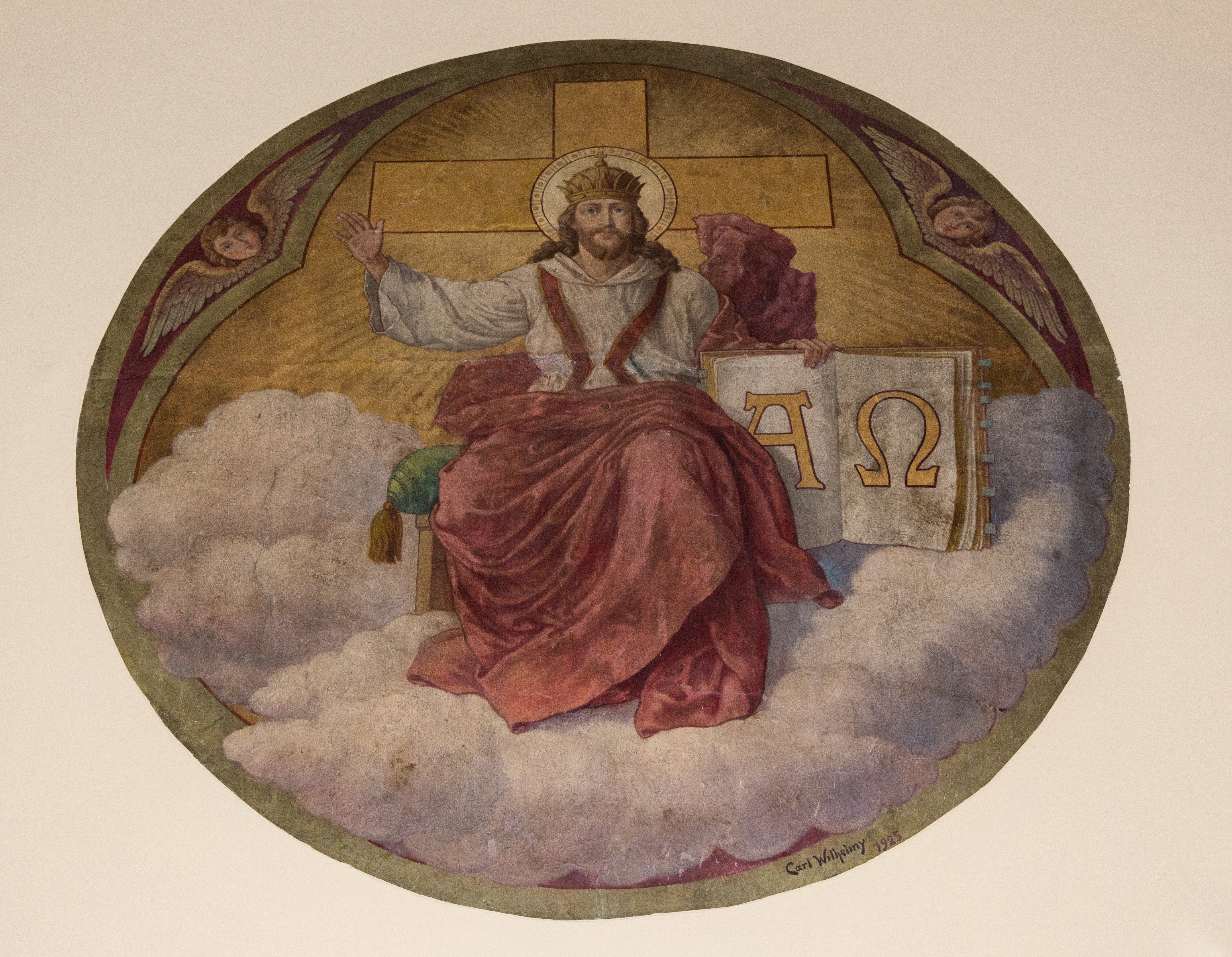 De Christus-Kinnek, Molerei um Duxall vun der Géisdrefer Kierch.